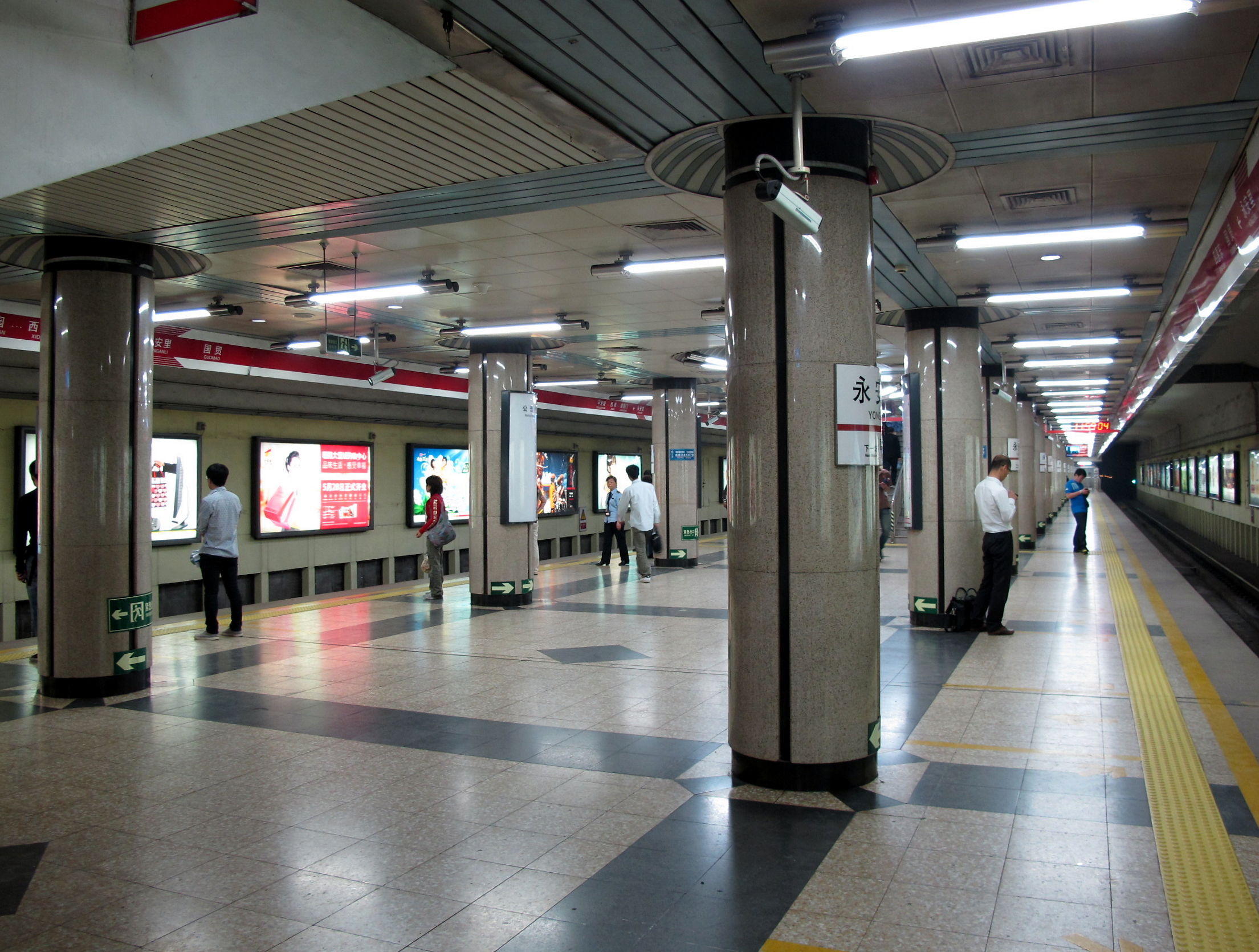 Beijing Subway Yong'anli Station 北京地鐵1號線永安里站